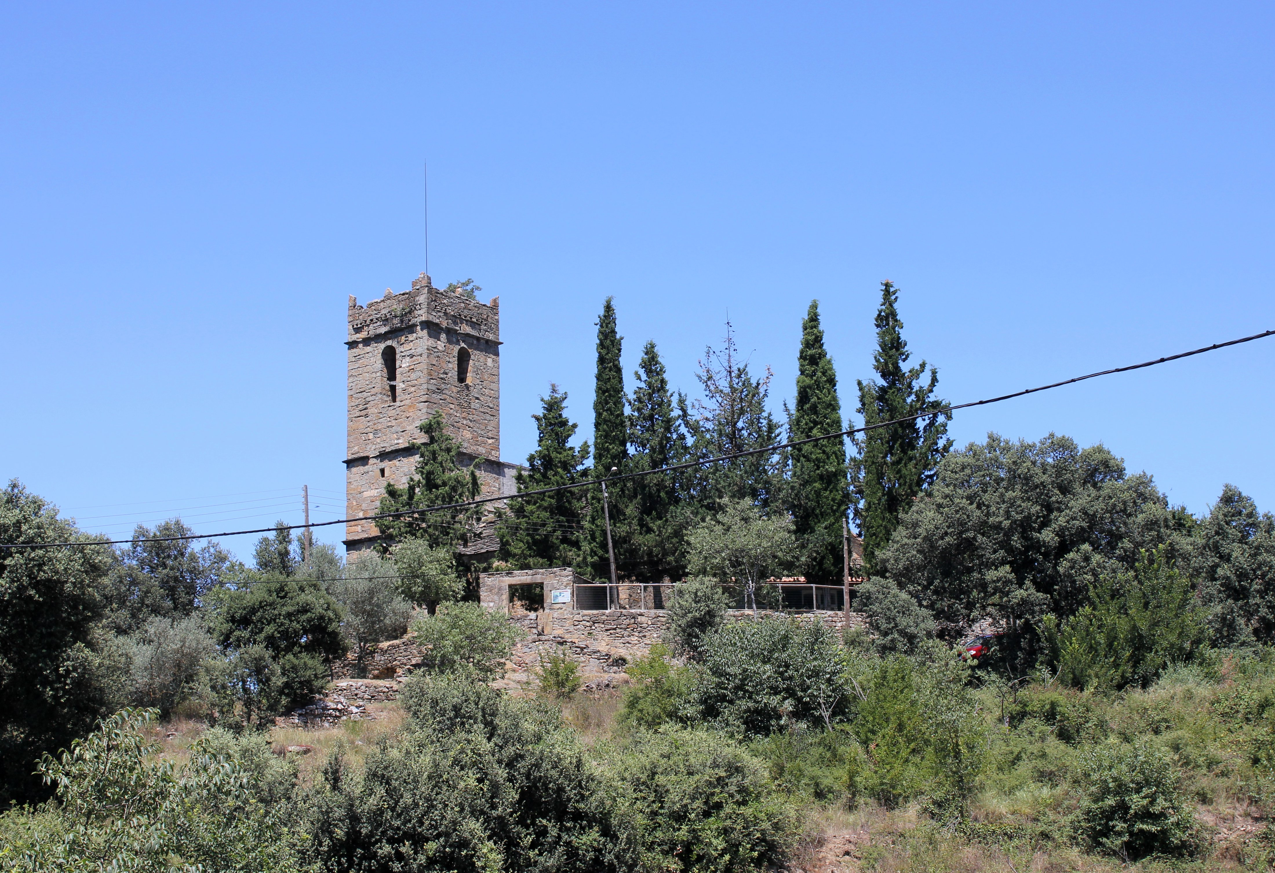 Iglesia de San Cristóbal en Morillo de Monclús (La Fueva). Aragonés: Ilesia de Sant Cristofo en Moriello de Monclús (A Fueva).